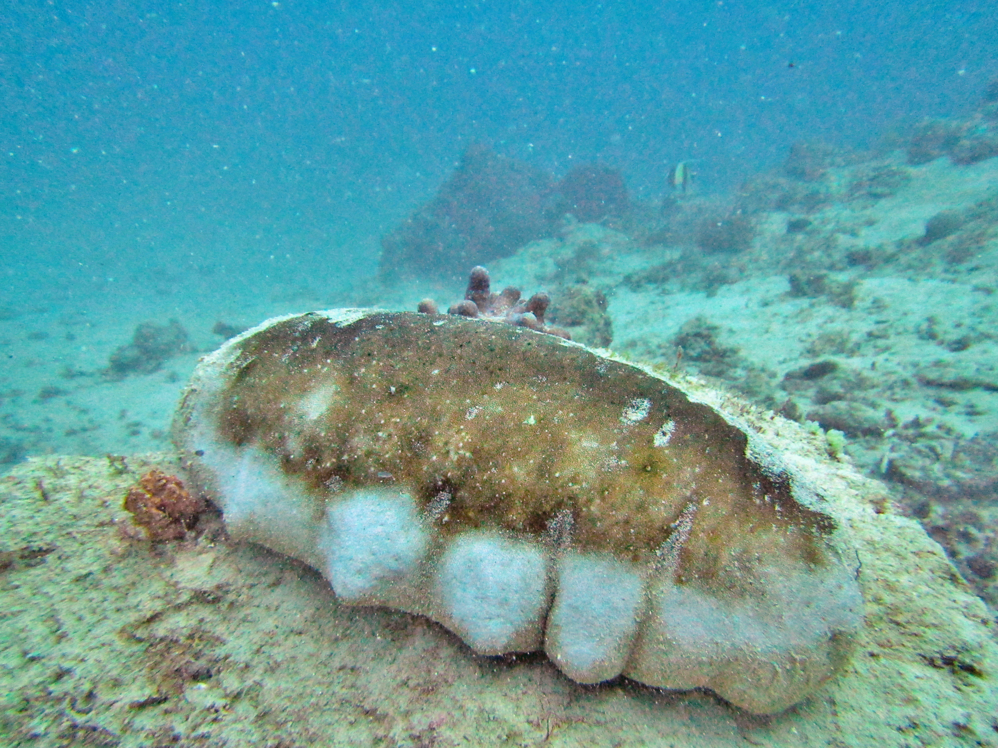 Une holothurie à mamelles (Holothuria fuscogilva) vue à la "Passe en S" à Mayotte.